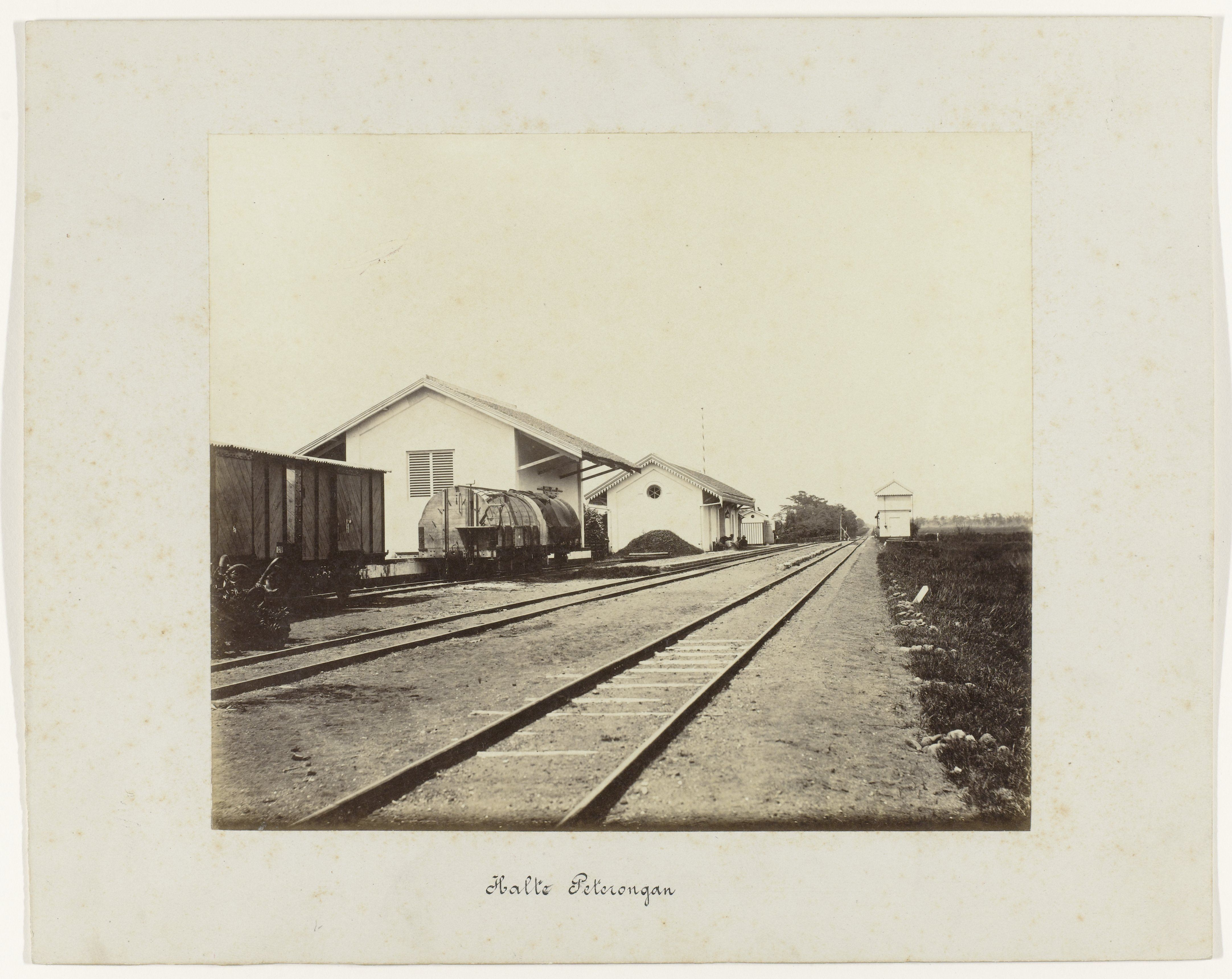 IdentificatieTitel(s): Halte Peterongan (titel op object)Staatsspoorwegen op Java (serietitel)Objecttype: foto Objectnummer: NG-1988-26-35Omschrijving: De spoorweg bij de halte Peterongan, bij het station enkele treinwagons. Onderdeel van een groep van 62 foto's in een doos met het opschrift "Staatsspoorwegen op Java" uit 1888.VervaardigingVervaardiger: fotograaf: anoniemPlaats vervaardiging: JavaDatering: 1880 - 1888Fysieke kenmerken: albuminedrukMateriaal: fotopapier Techniek: albuminedrukAfmetingen: foto: h 175 mm × b 210 mmkarton: h 250 mm × b 230 mmOnderwerpWanneer: 1880 - 1888Waar: JavaVerwerving en rechtenVerwerving: aankoop 30-aug-1988Copyright: Publiek domein